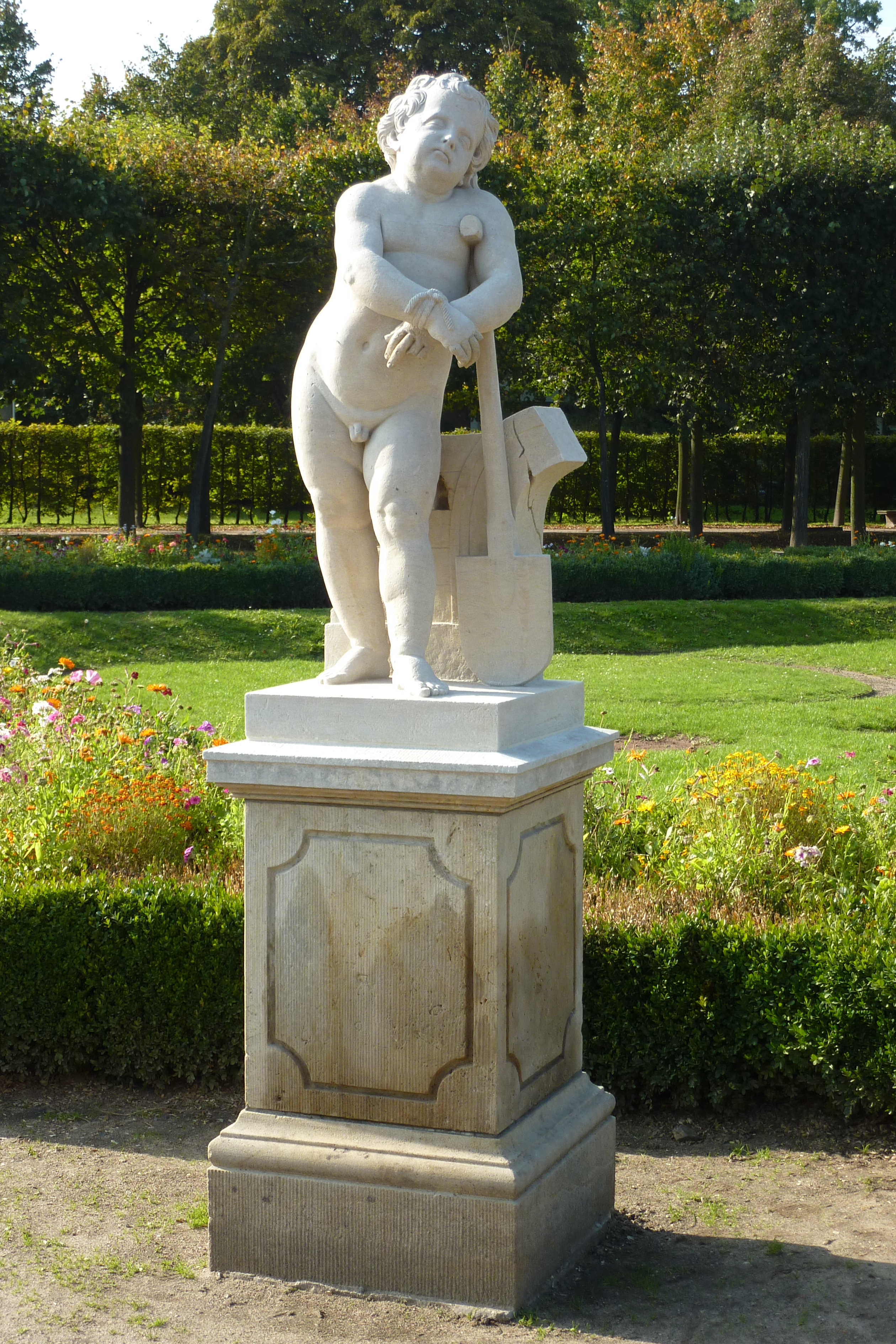 Skulptur „Phlegmatiker“ der „Vier Temperamente“ nach Gottfried Knöffler, Nordwestposition im nördlichen Rondell des Schlossgartens im Tierpark Berlin (Friedrichsfelde). Kopie von Rolf Winkler und Heinz Worner aus dem Jahr 1960.